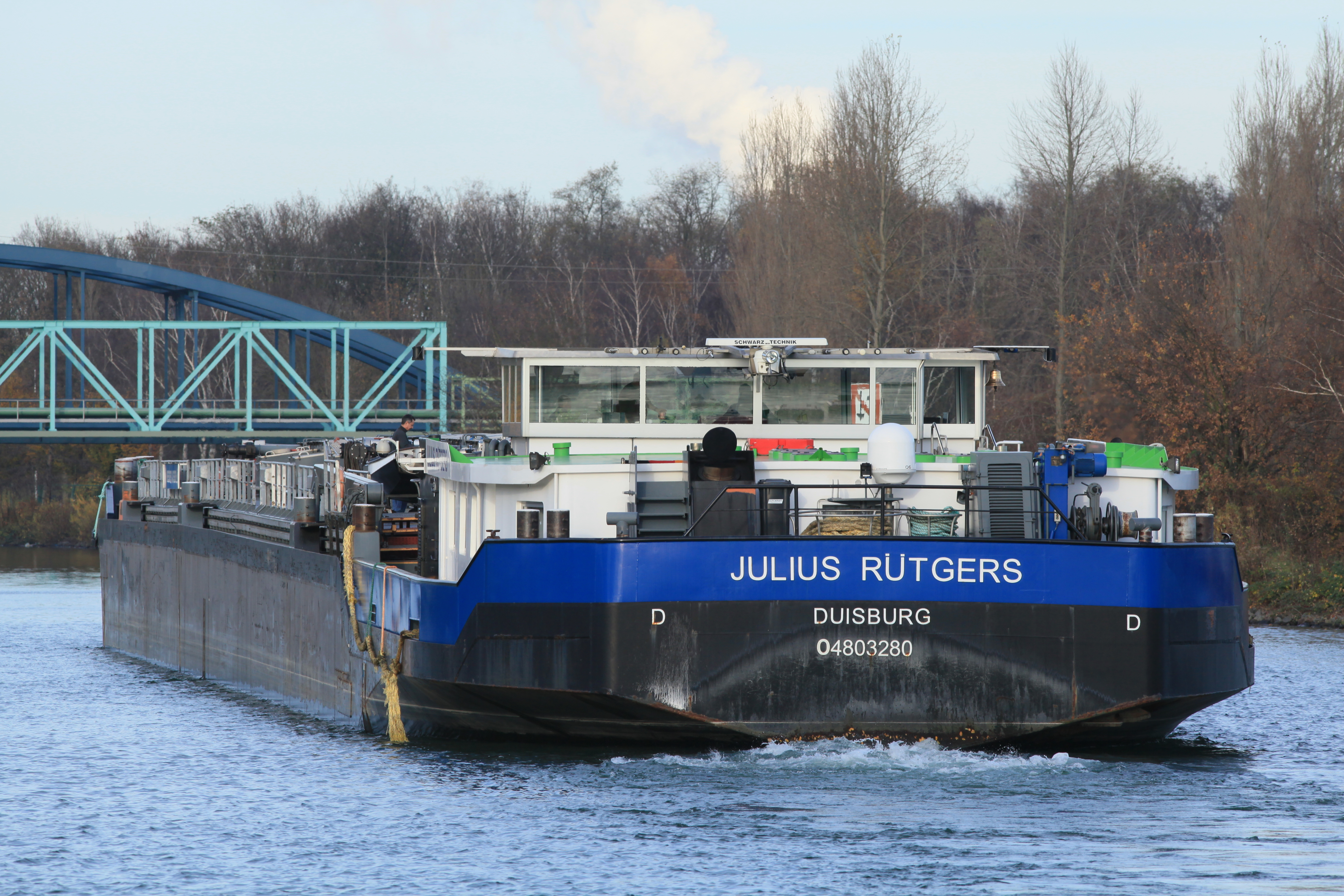 Blick vom Fußweg Weidenstraße-Im Ellingroth zur Julius Rütgers im Dortmund-Emskanal in Dortmund